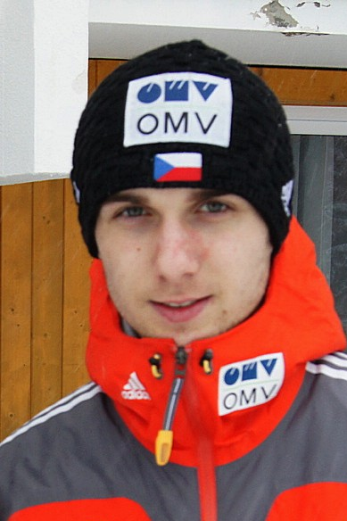 Mazoch Jiří